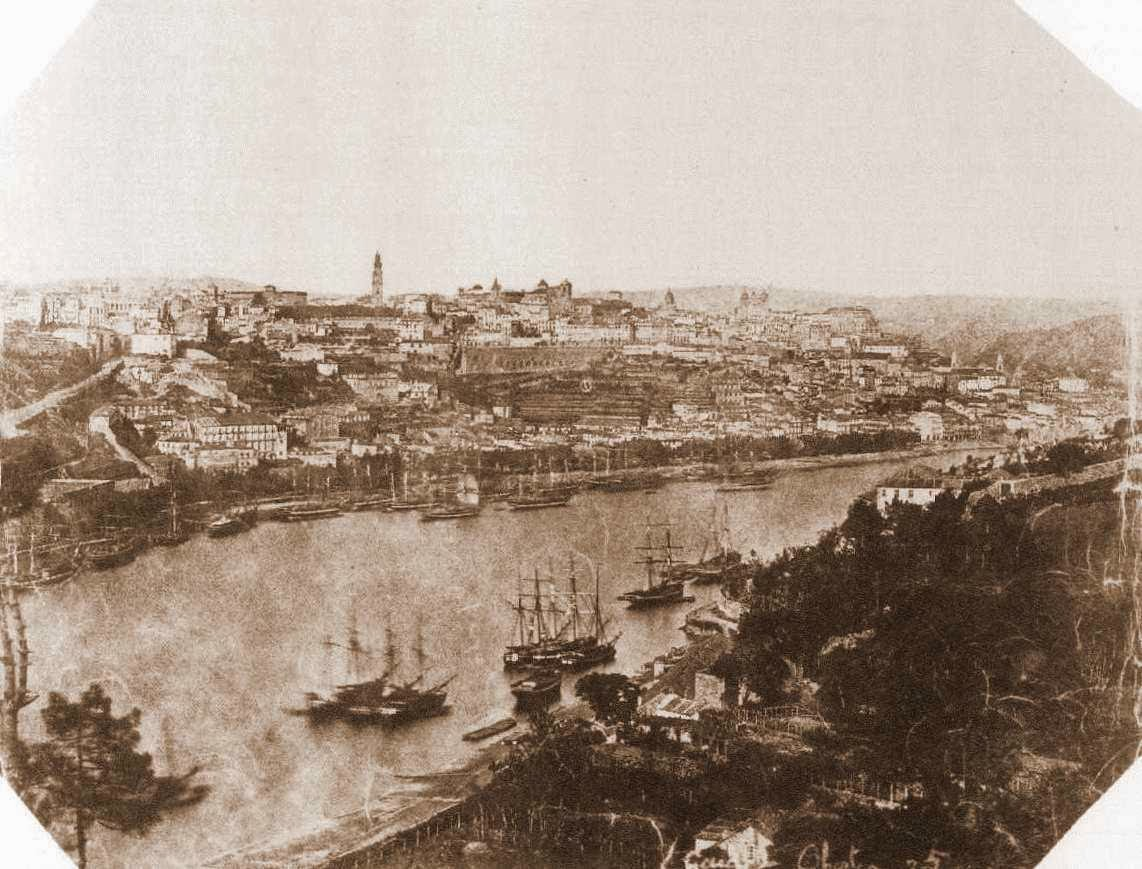 Porto. Vista parcial da cidade em 1849. Frederick William Flower.